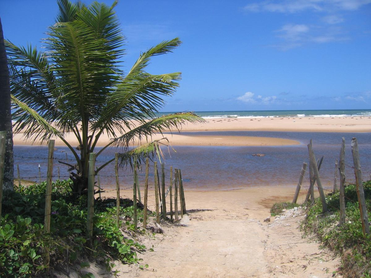 Caminho do Mar, Imbassai,Bahia, Brazil